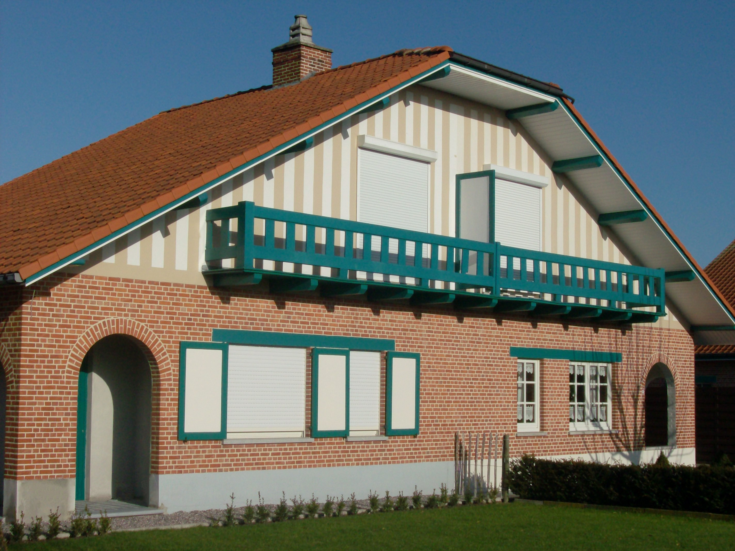 The old houses in Oudenbos, Lokeren, Belgium